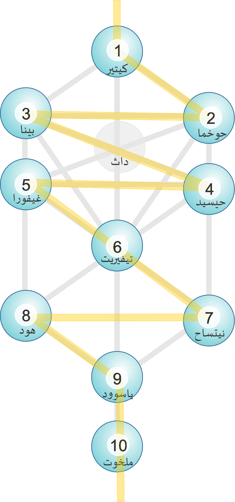 ممرات شجرة الحياة